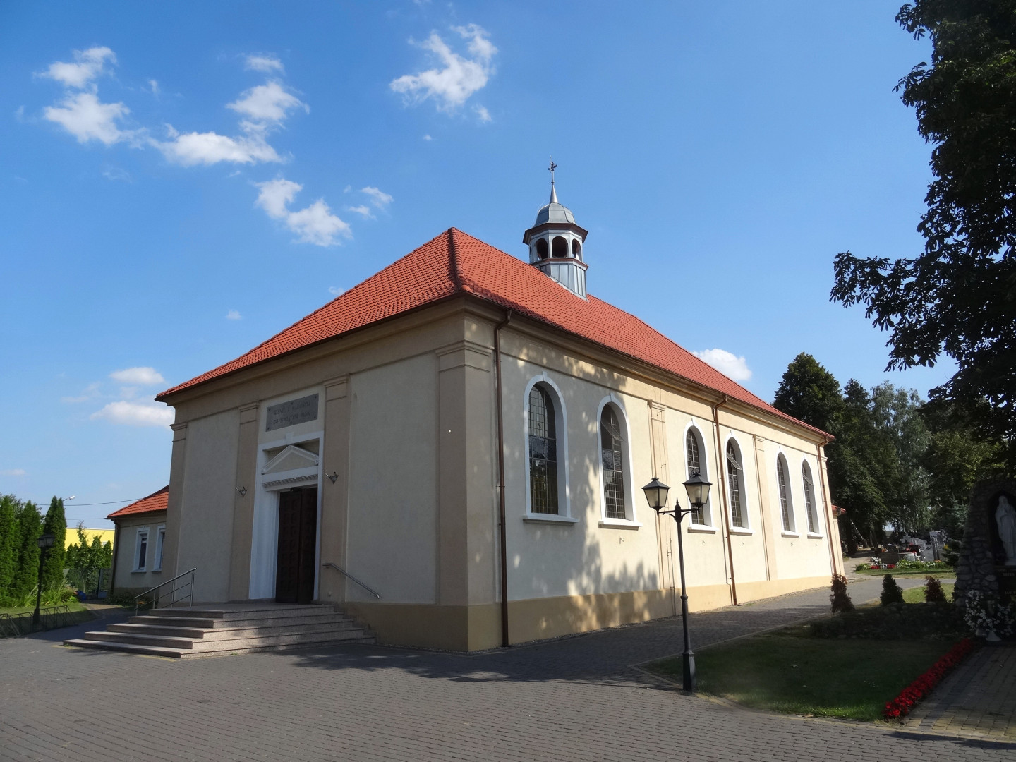 Kościół św. Andrzeja Boboli i św. Antoniego z Padwy w Złotnikach Kujawskich